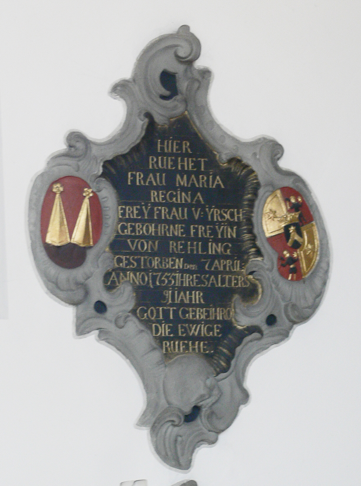 Pfarrkirche St. Konrad und Vinzenz, Fronhofen, Gemeinde Fronreute, Landkreis Ravensburg Epitaph für Regina von Yrsch, geb. von Rehling, 1755